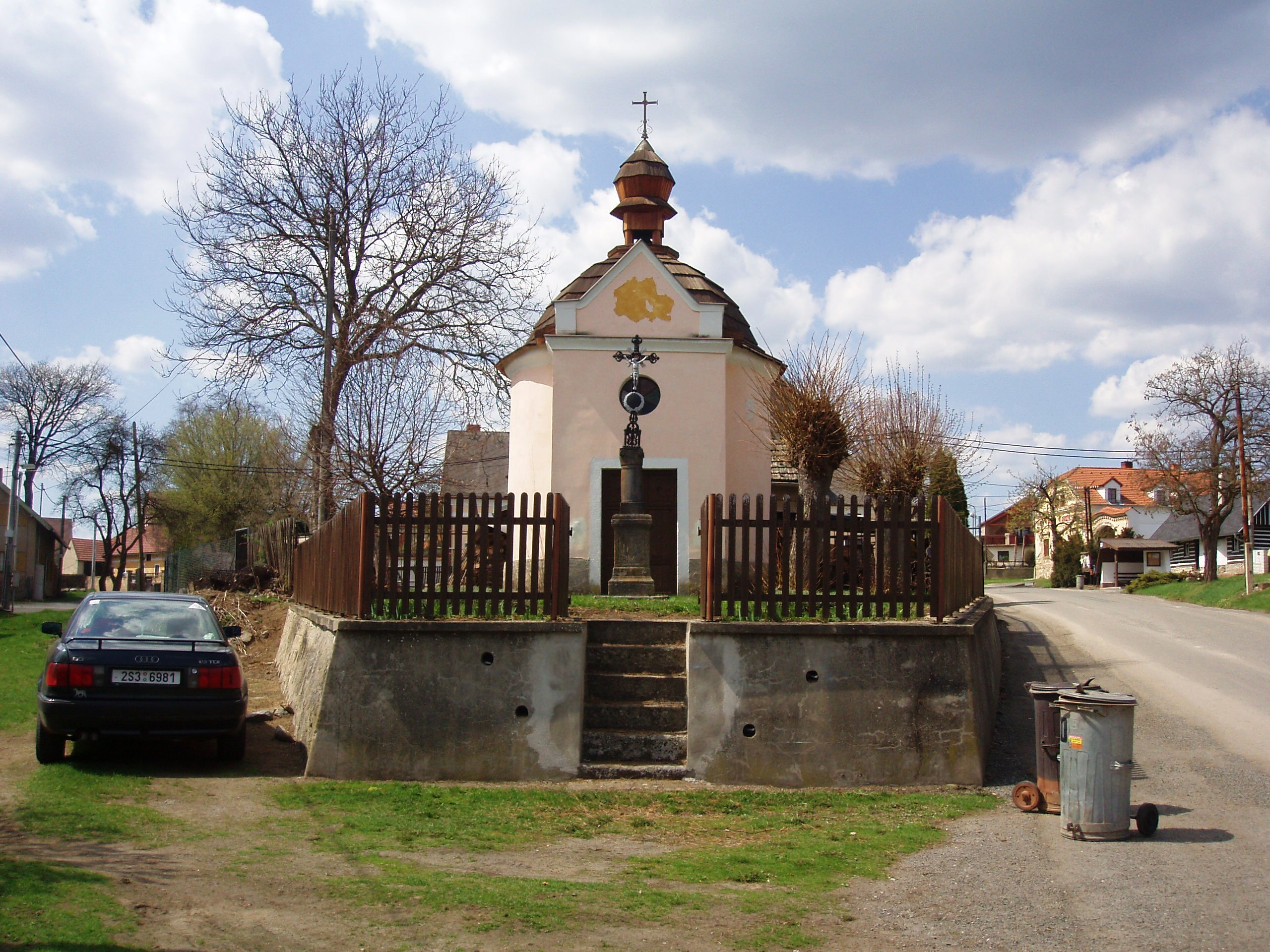 Kaple v Horních Hbitech